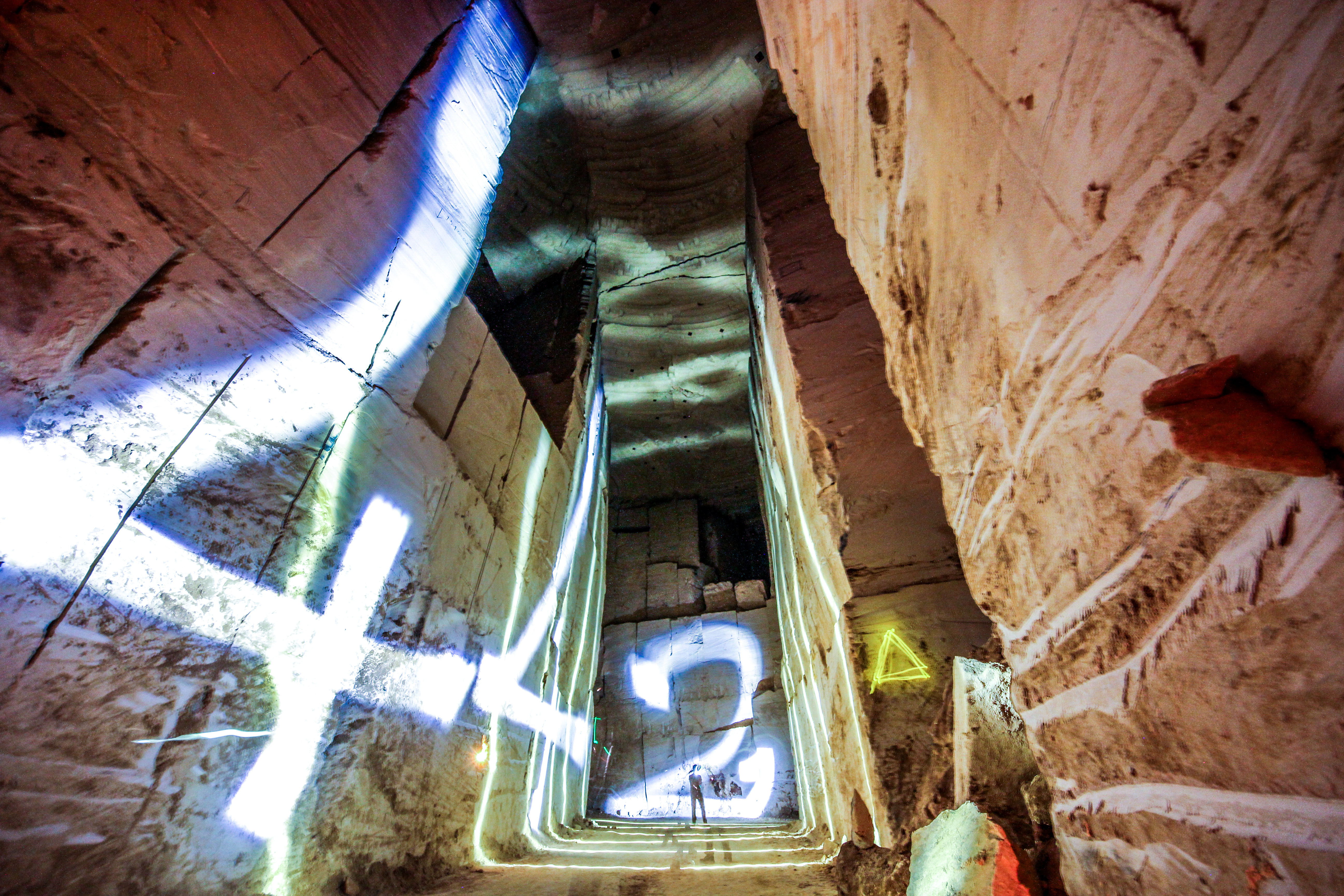 Light Painting in a chalk quarry in the south of France by the exploration group 442 Explorations